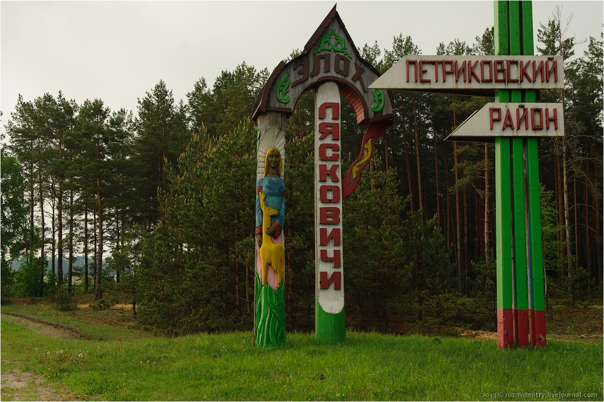 Въезд в агрогородок Лясковичи, Белоруссия